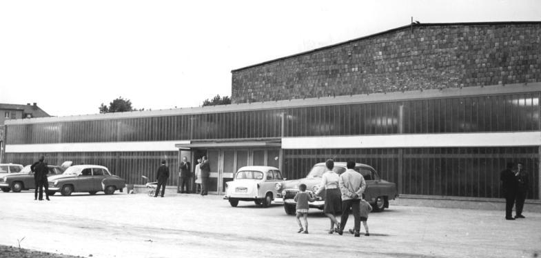 Gera, Erwin-Panndorf-Sporthalle Zentralbild Liebers scha-23.4.69-Gera: Blick auf die neue Erwin-Panndorf-Sporthalle.